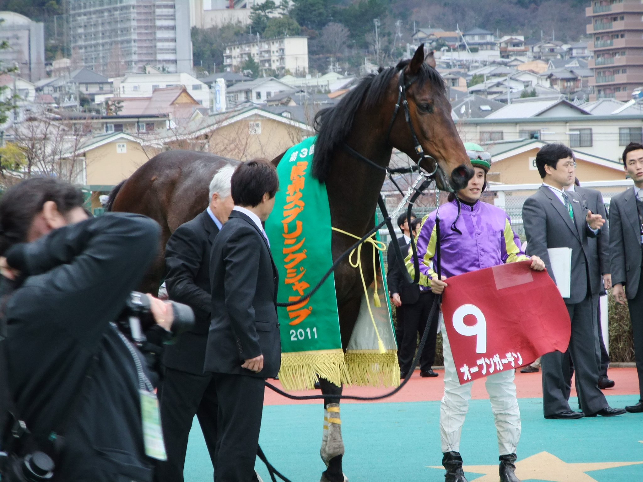 オープンガーデン 2011/3/21 阪神スプリングジャンプ優勝